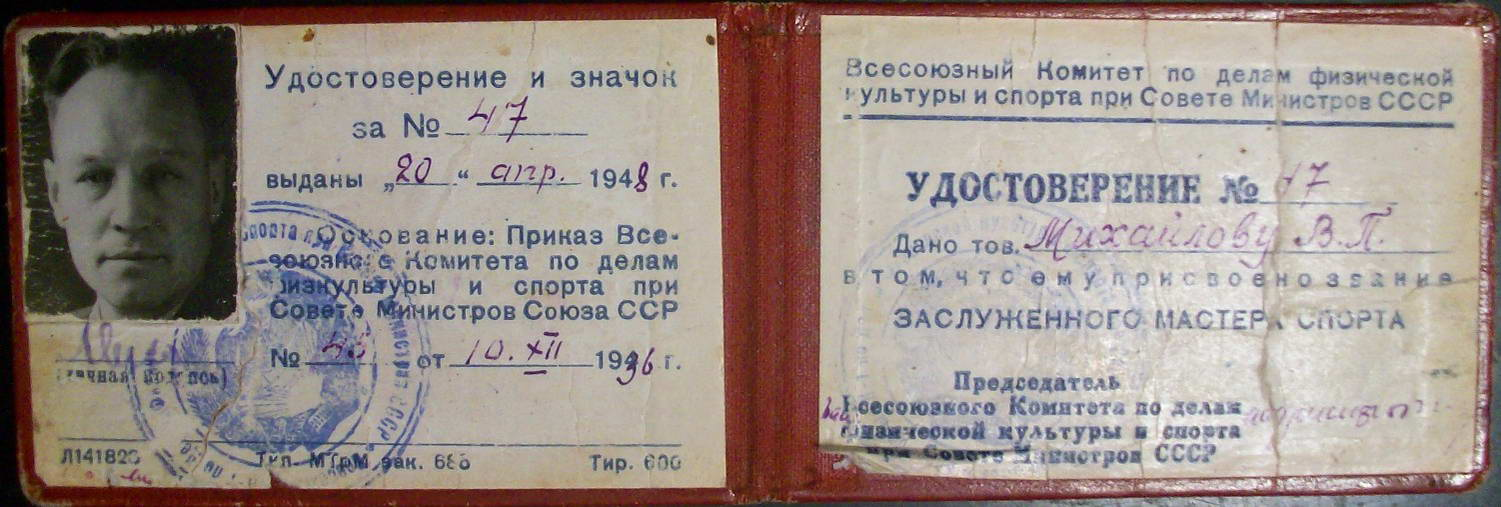 Удостоверение № 47 к почётному спортивному званию «Заслуженный мастер спорта СССР», которого был удостоен 10.XII.1936 боксёр В. П. Михайлов